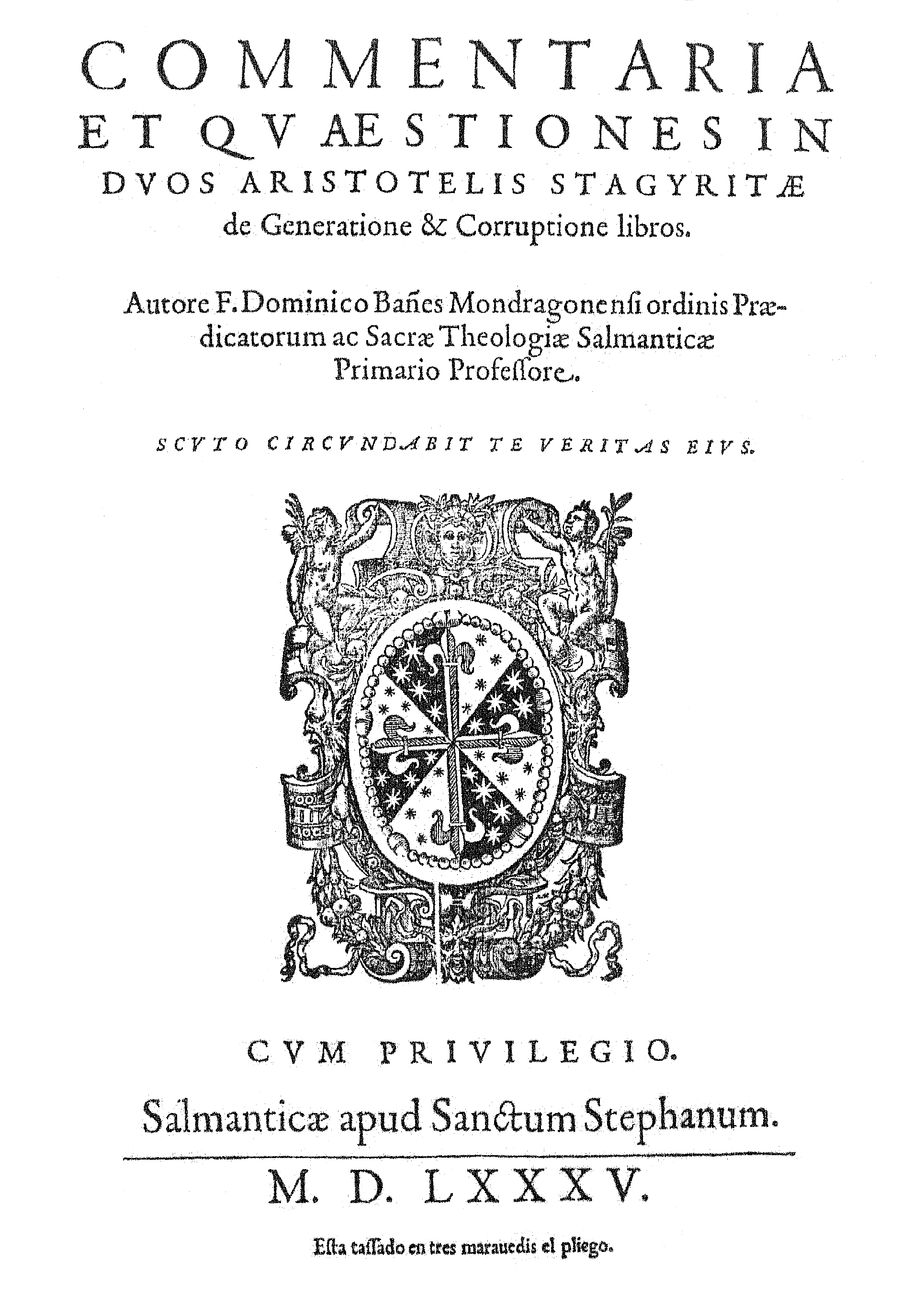 Portada del libro Commentaria et quaestiones in duos Aristotelis Stagyritae De generatione & corruptione libros. Publicado por Domingo Báñez en Salamanca en 1585.